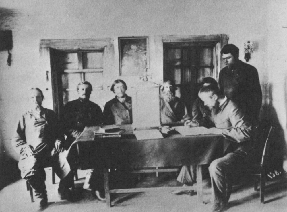 Russischer Photograph: Ein Wolost-(Guts)Gericht in der Sitzung